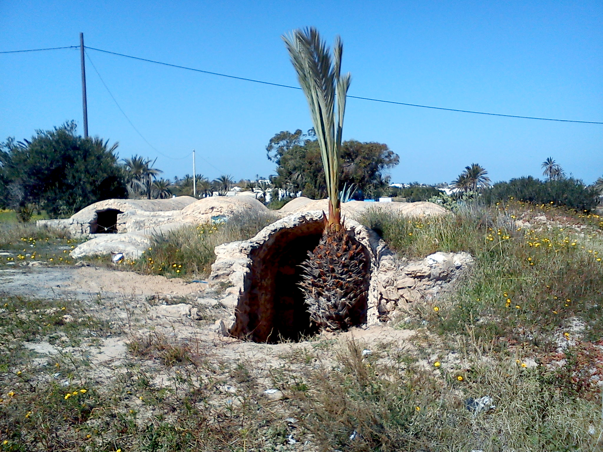 Une huilerie souterraine, Lajimi, Mezraya